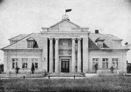 Dom strzelecki w Przygodzicach (powiat Ostrów).